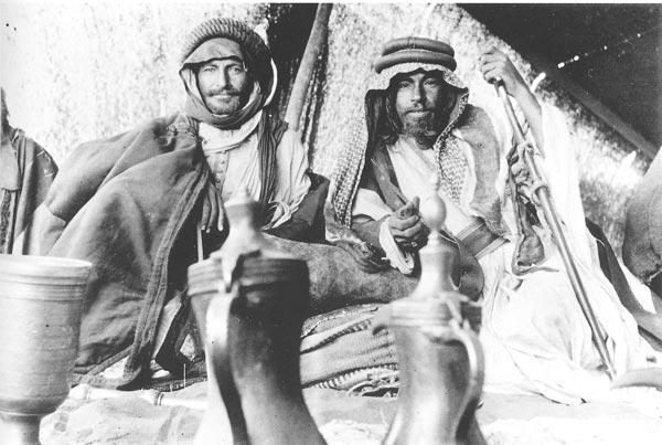 صورة لرجال من قبيله الحويطات عام 1333 هجريّة